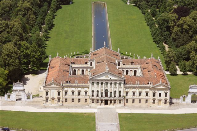 Stra. Villa Pisani dall'alto